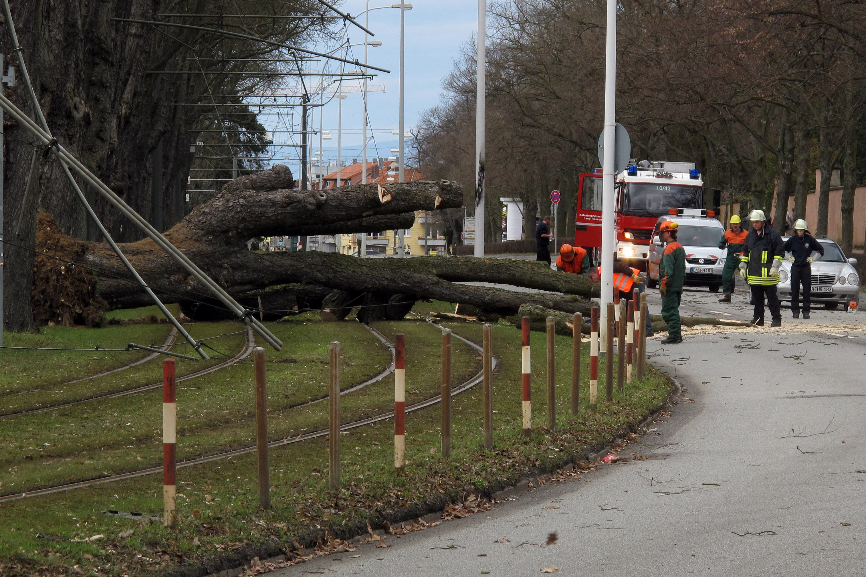 Der Orkan "Xynthia" hinterließ auch in Darmstadt bei Frankfurt seine Spuren und entwurzelte diesen mächtigen Baum, der auf die Oberleitung stürzte und diese niederriss. Die Straßenbahnen 2 und 9 konnten nicht mehr fahren. Video ansehen